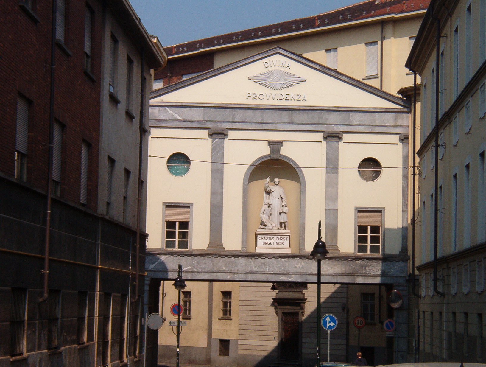 Piccola Casa della Divina Provvidenza - Torino - Italy